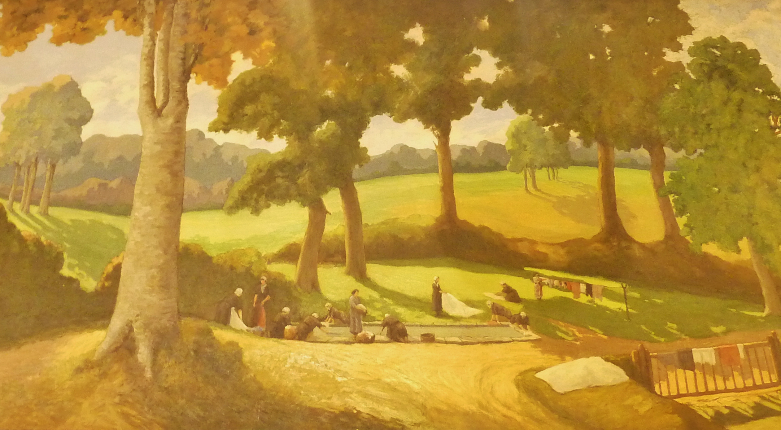 Robert Paulo Vilar : Le lavoir des Plomarch (Douarnenez, halles)